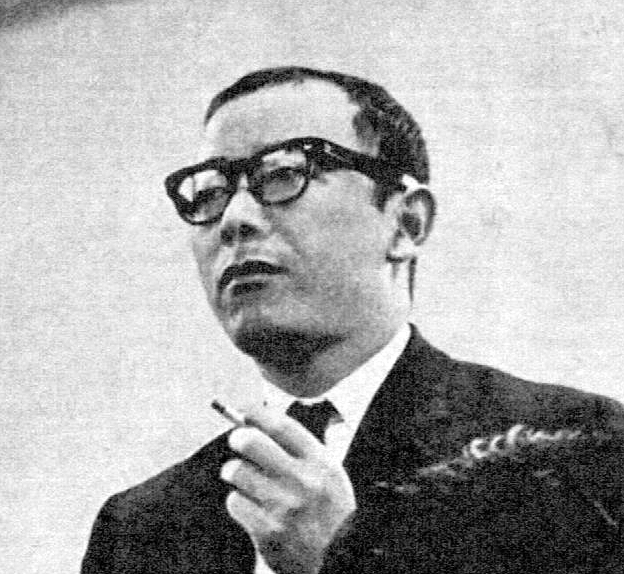 文藝春秋社『別冊文藝春秋』第92号（1965）より山口瞳